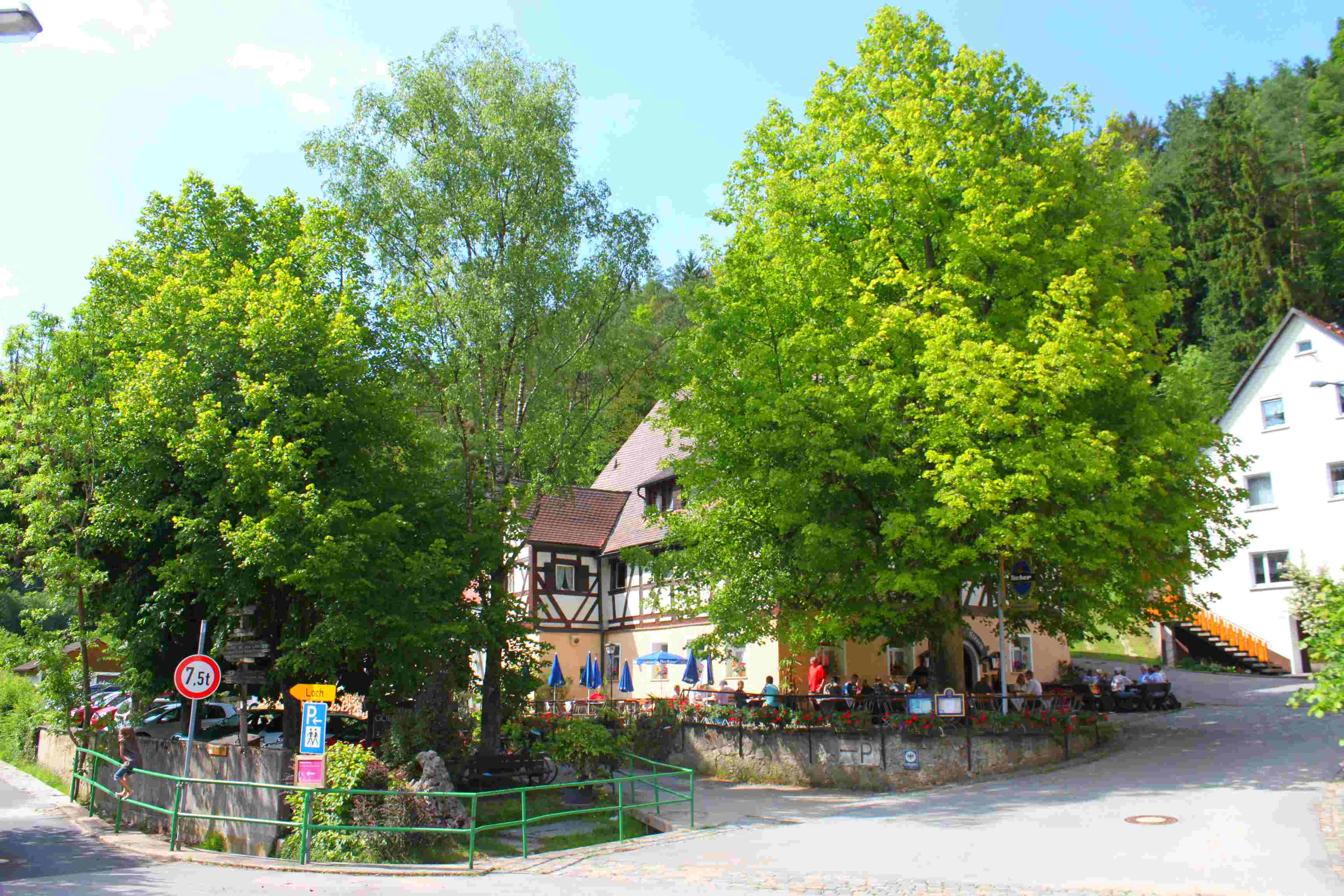 Der Dorfplatz von Hirschbach mit dem Gasthof Goldener Hirsch